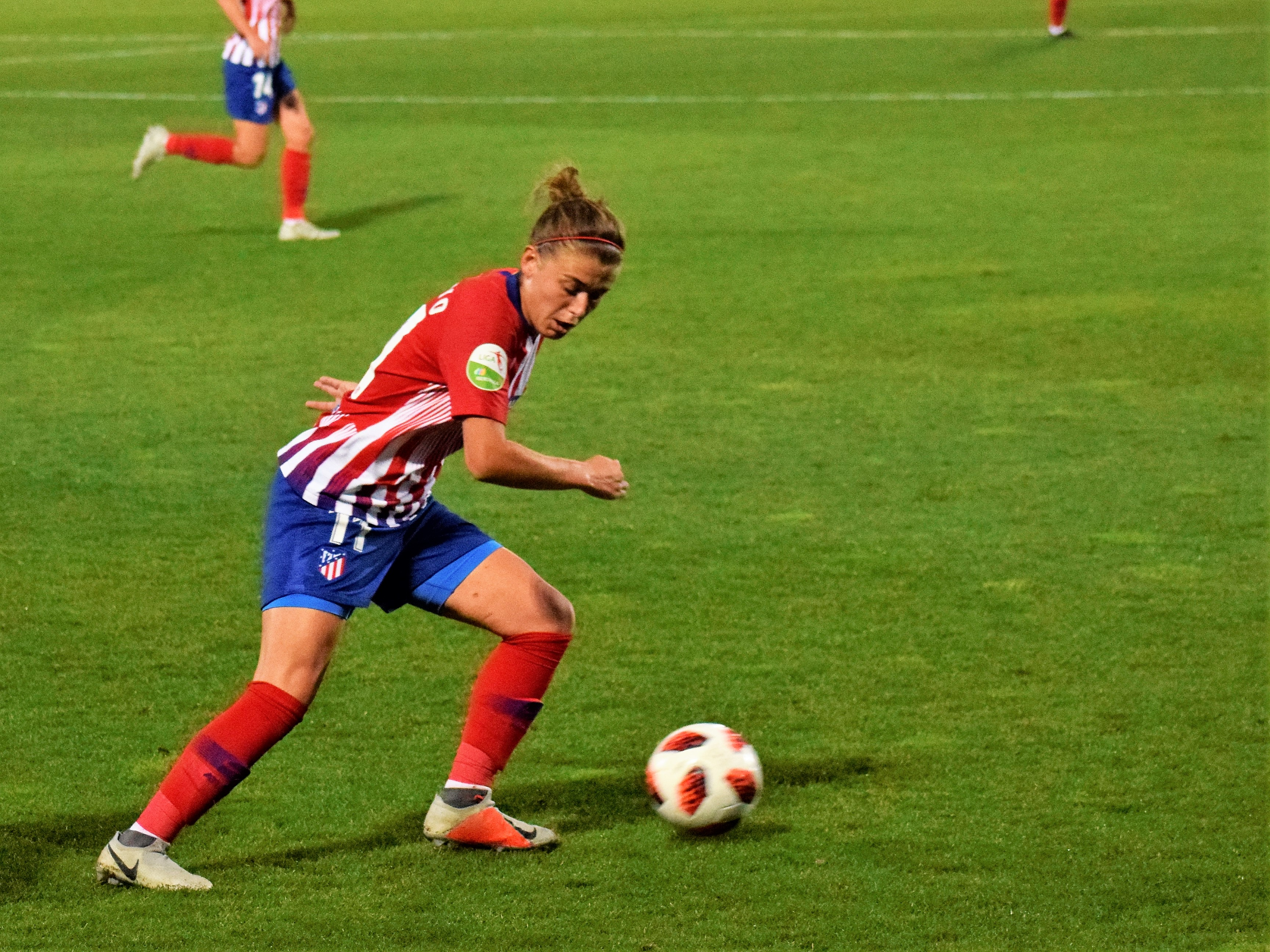 Carmen Menayo jugando con el Atlético de Madrid